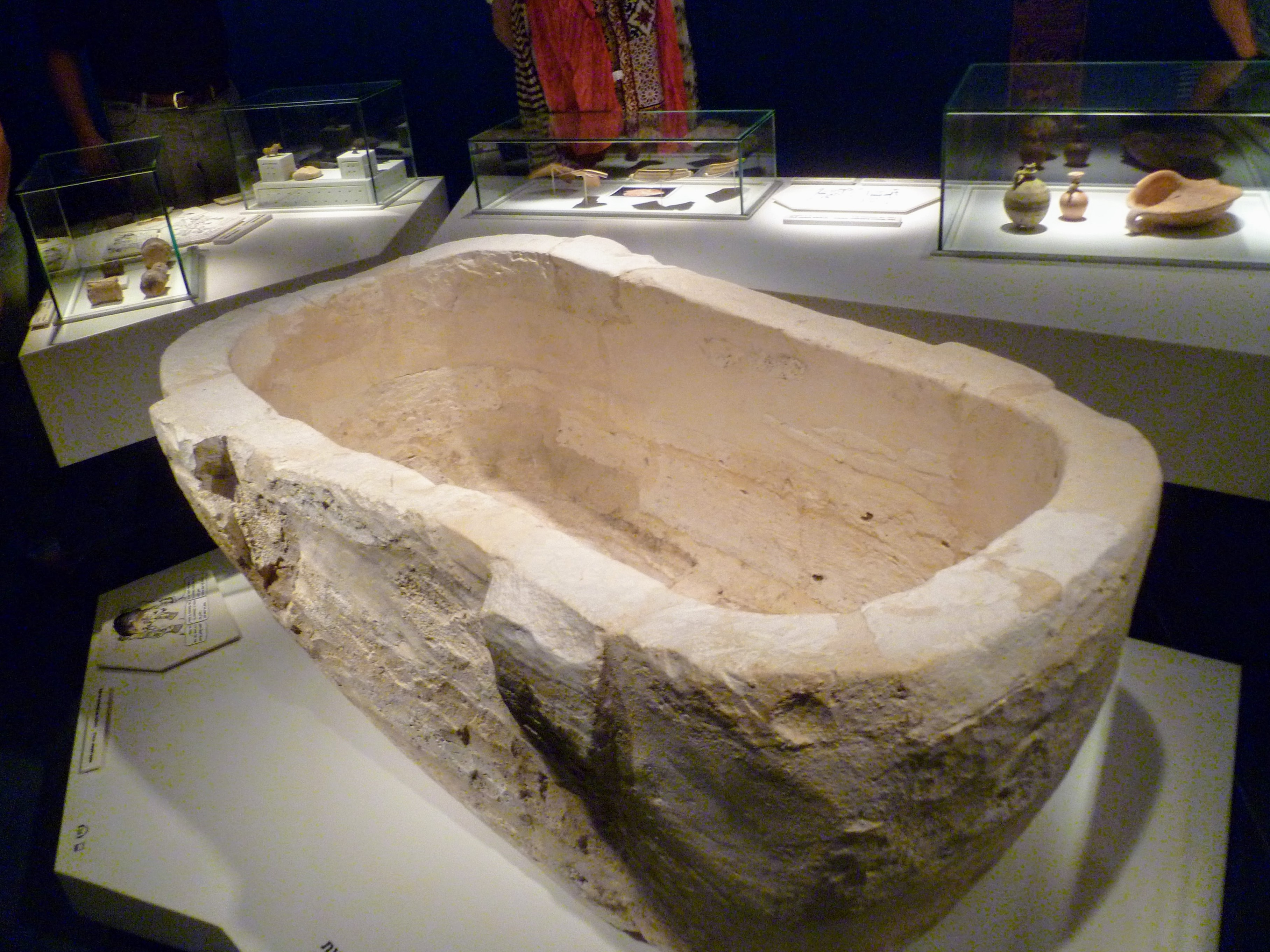 אגן רחצה קדום